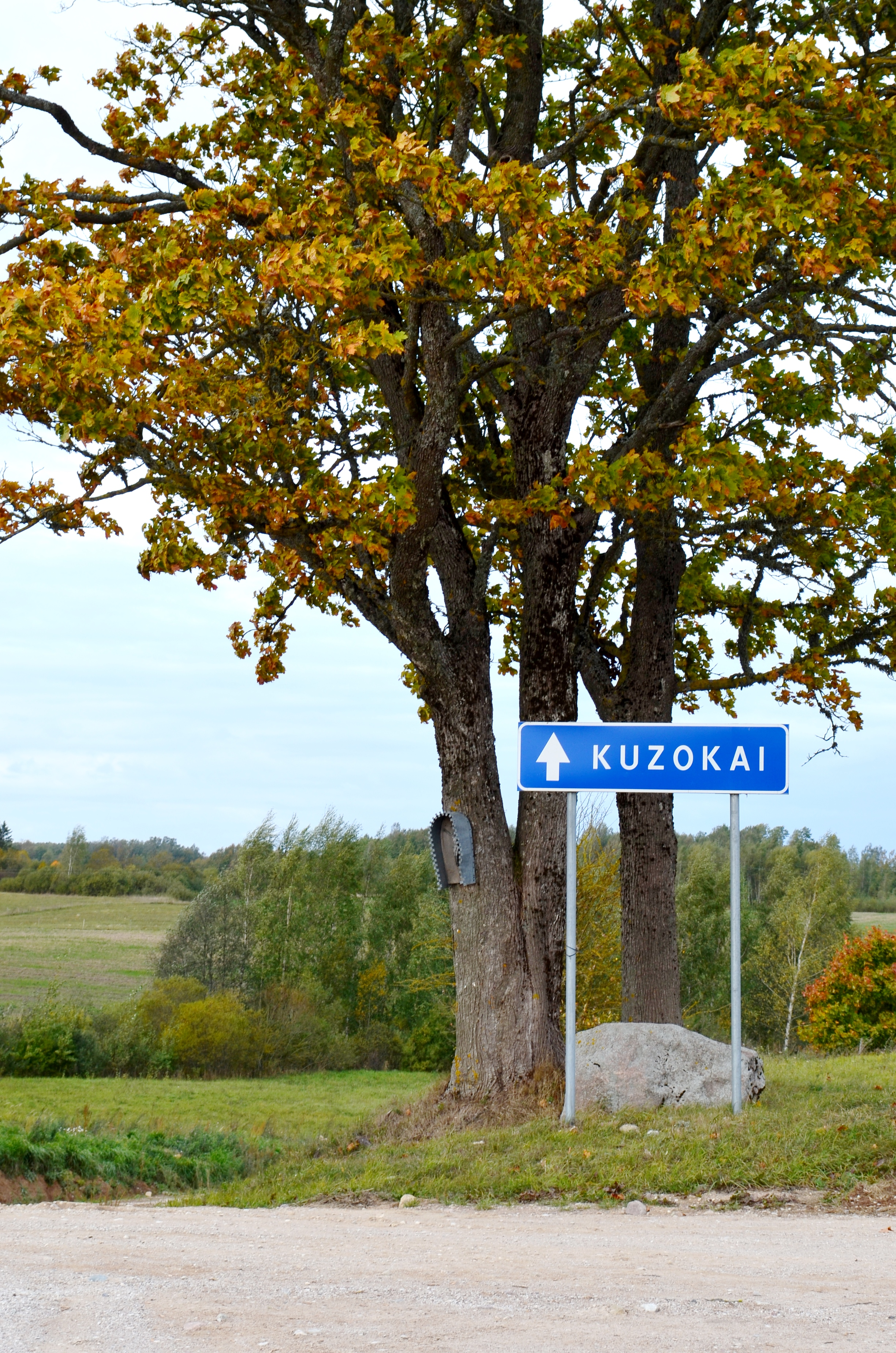 Medžio koplytėlė prie sankryžos, Vaišviliškiai, Liolių sen., Kelmės raj.